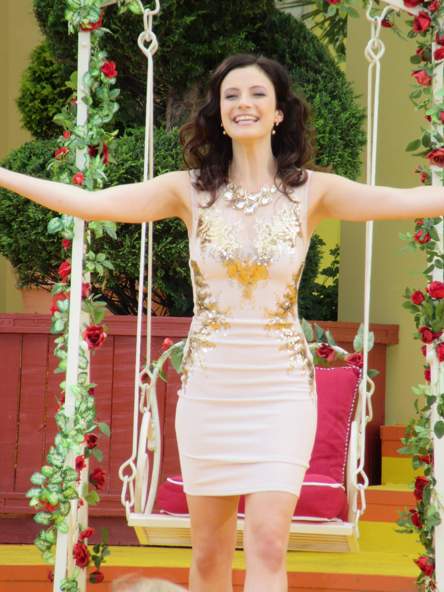 Ilka Wolf in der TV-Sendung „Immer wieder Sonntags" am 20. Juli 2014